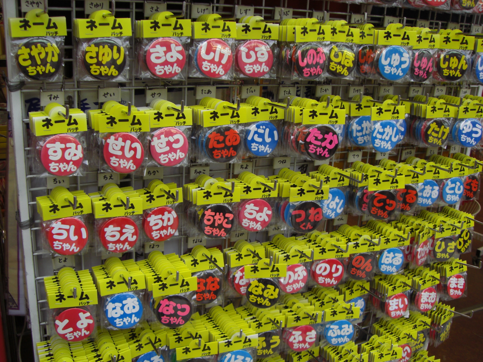 CIMG1657